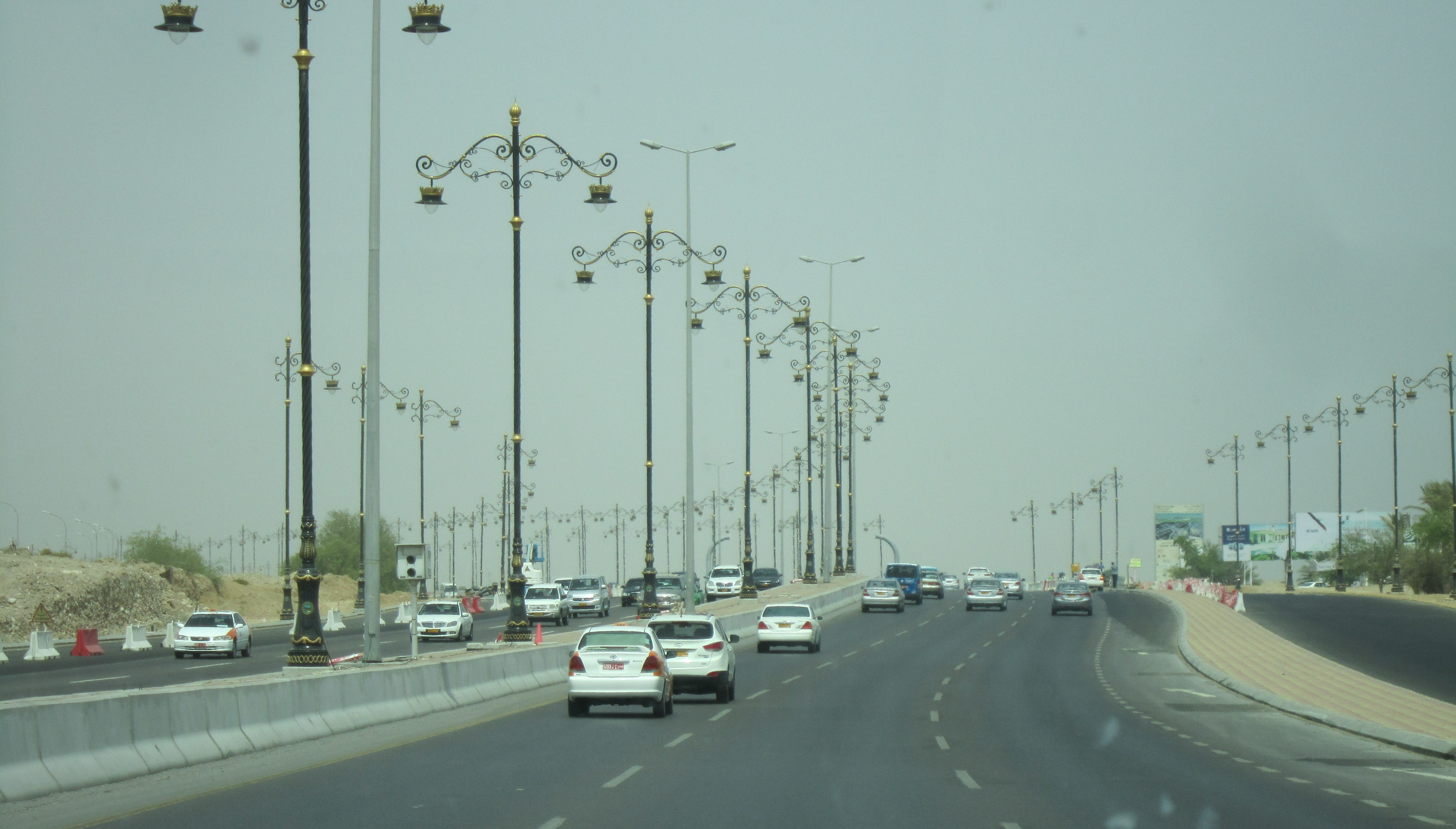 Oman R1